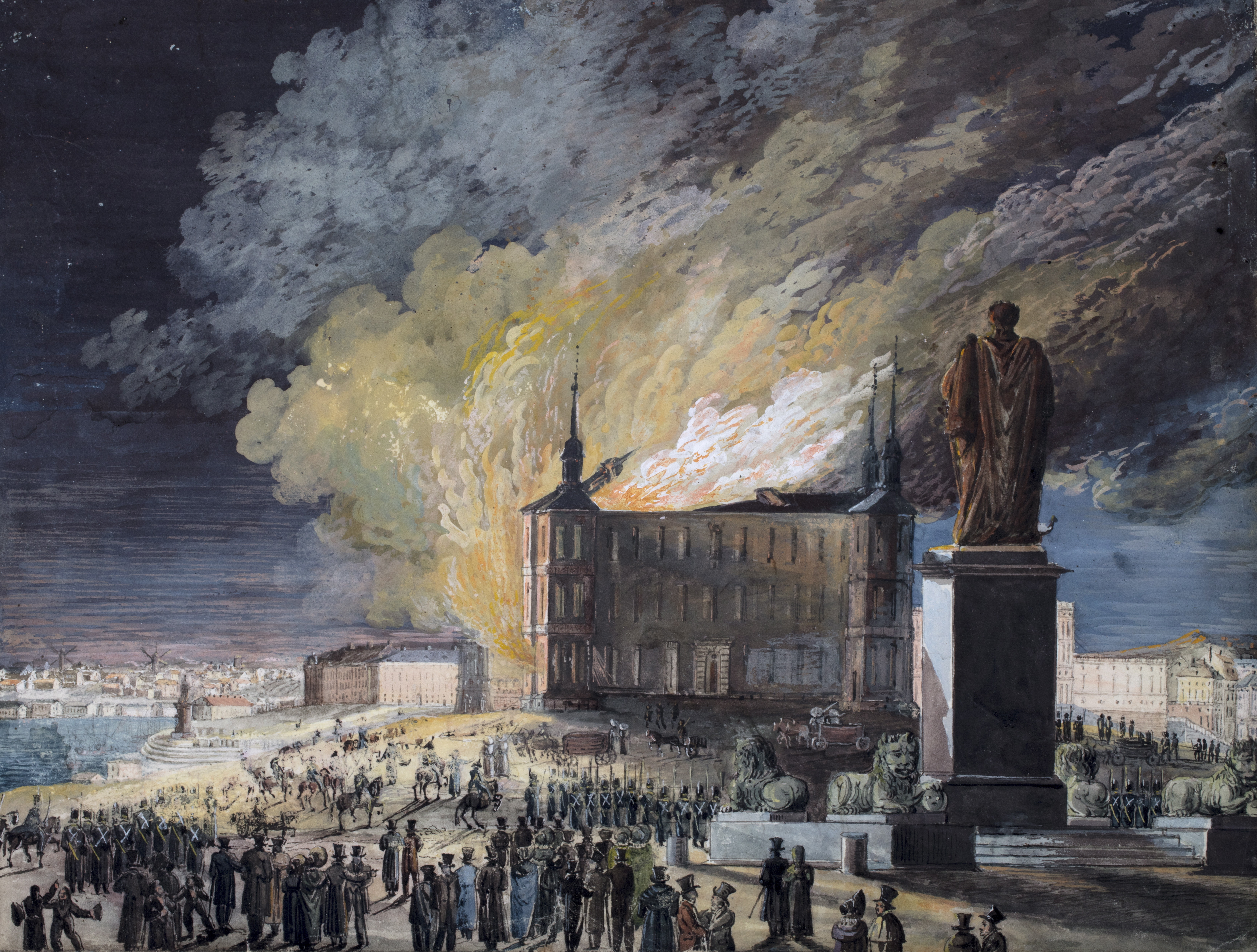 Palatset Makalös brand 24/11 1825.Palatset Makalös söder om Kungsträdgården i Stockholm brinner 24 november 1825. Huset brann ned under pågående föreställning. År 1793 hade palatset Makalös, det tidigare gamla kungliga lusthuset, fungerat såsom arsenal sedan 1693. Arsenalen förvandlades 1793 till kunglig dramatisk teater. Material och teknik: Gouache. Underlag: Papper. Mått i mm: 220x282.